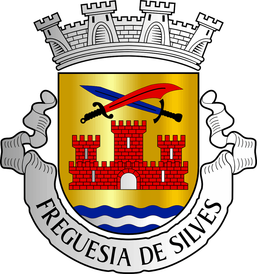 brasão da freguesia de Silves